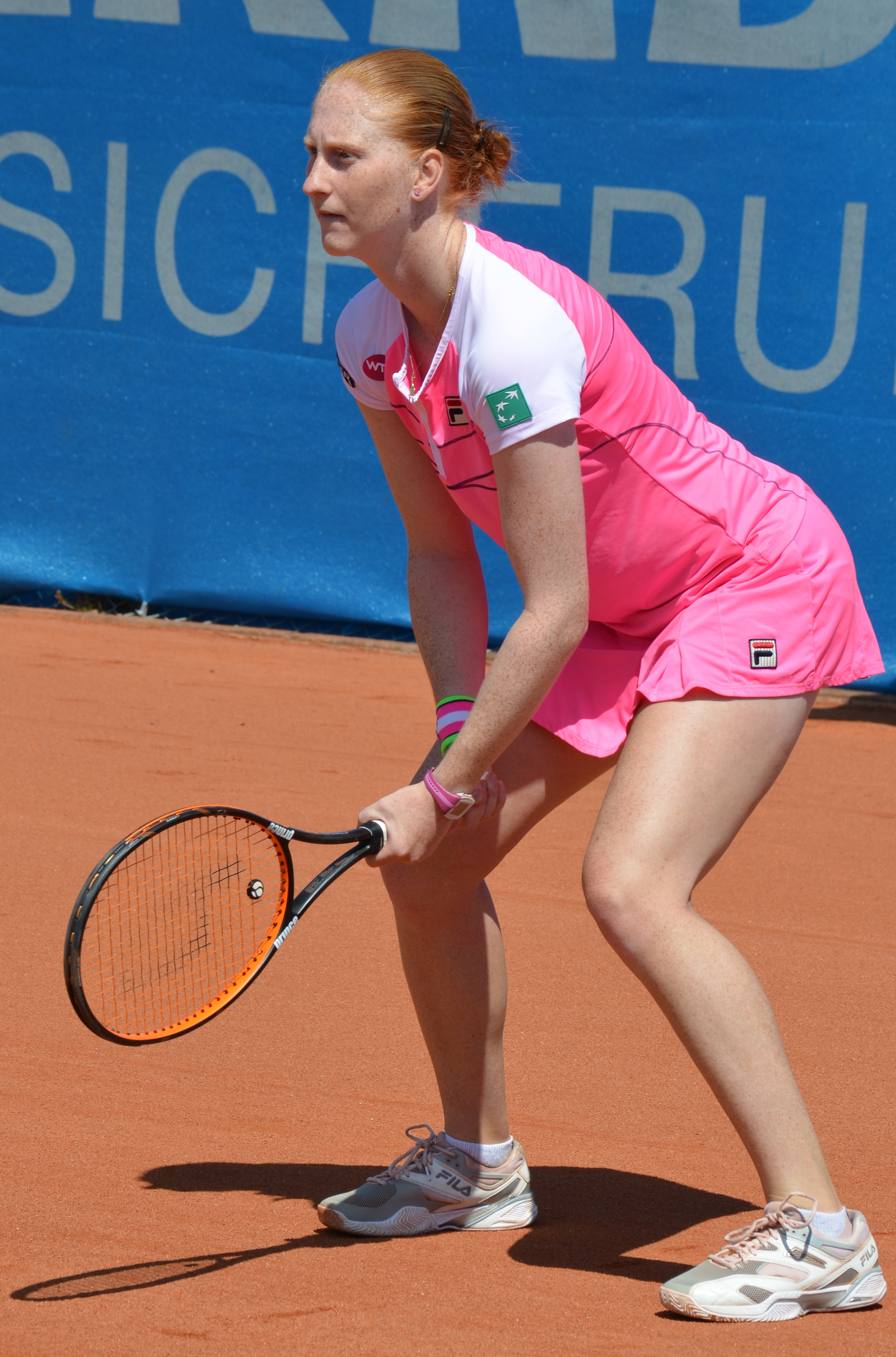 Alison Van Uytvanck in der Qualifikationsbegegnung des Nürnberger Versicherungscup 2015 gegen Kateřina Vaňková am 16.05.2015